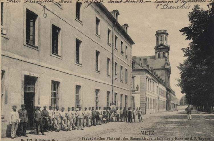 Kiswahili: bayerische Infanteriekaserne in der Aimèstrasse